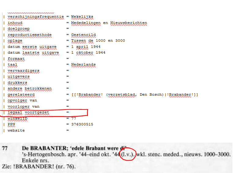 Indicatie van een legale voortzetting (l.v.) van een verzetskrant - screenshot van deze infobox (dd 22-4-2016), krant = Winkelnr 77